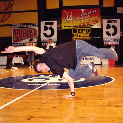 Murteho freez na BOTY CZ 2006